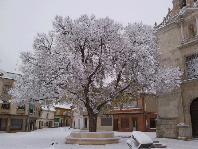 La Olma nevada en Honrubia (Cuenca) el 14 de diciembre de 2009.